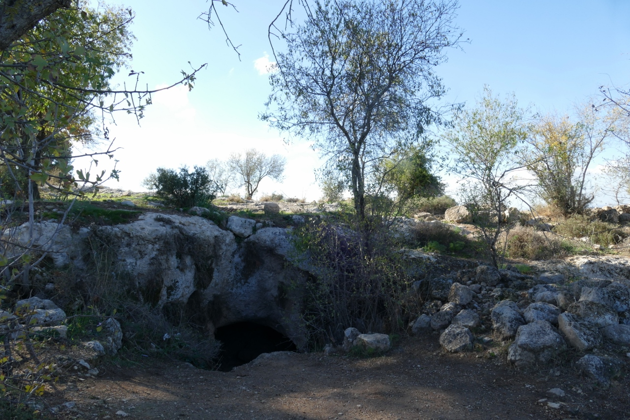 Horvat Eqed